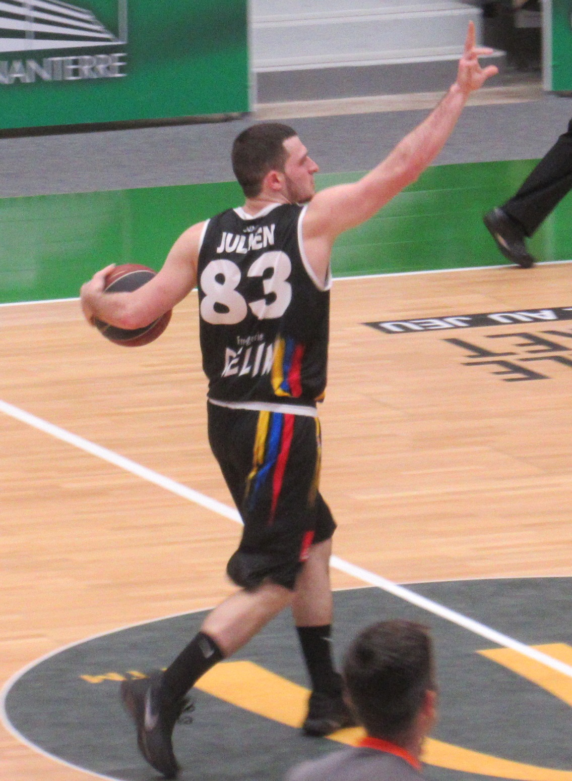 Axel Julien avec le maillot de Dijon